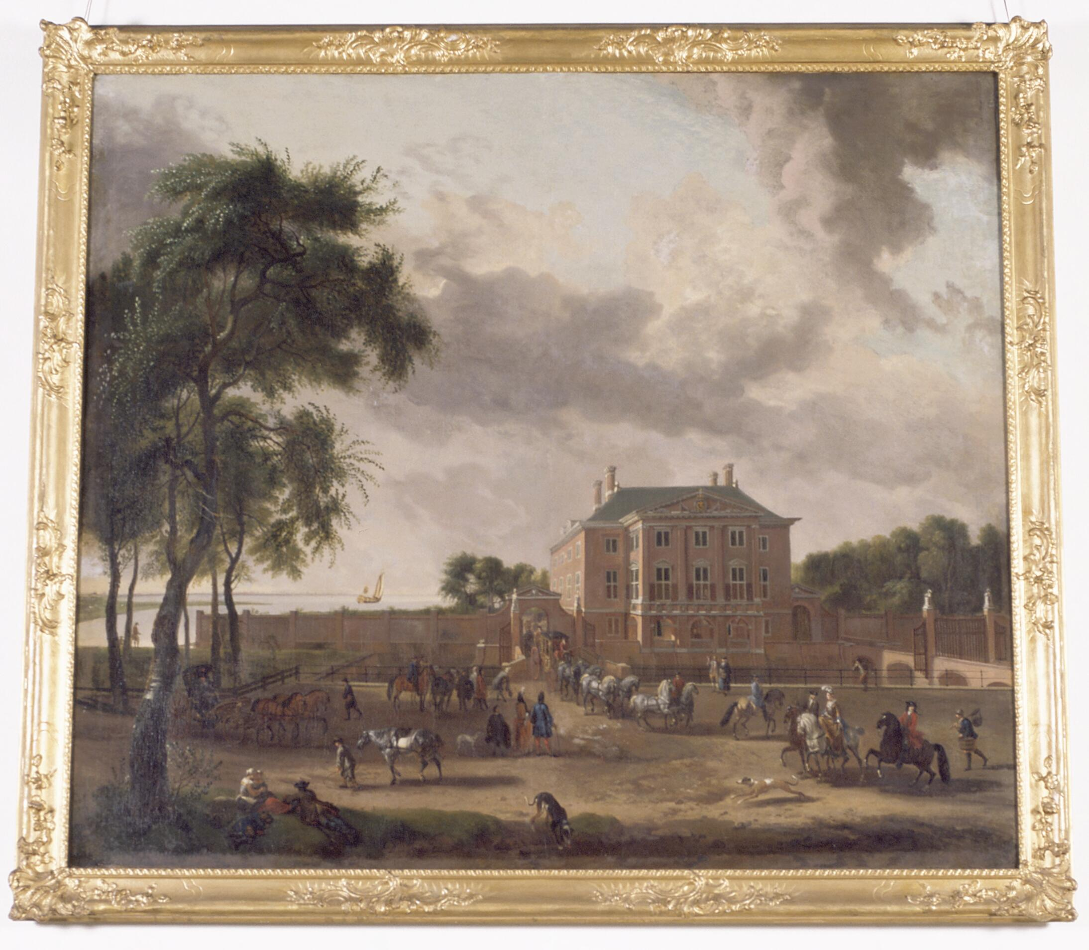 Op de achtergrond van het schilderij is een zeiljacht te zien, varend op het Haarlemmermeer. Aan weerszijden van het gemeenlandshuis zien we een poort waarop een zwaan is afgebeeld. Het huis bood meermaals onderdak aan vorsten uit het Huis van Oranje en van andere aanzienlijke personen. Het kan zijn dat een van die bezoeken op dit schilderij is vastgelegd. Het schilderij was oorspronkelijk bestemd als schoorsteenstuk voor de rode zaal van het gemeenlandshuis in Leiden, dit blijkt uit de bijlage van de rekening uit 1702.